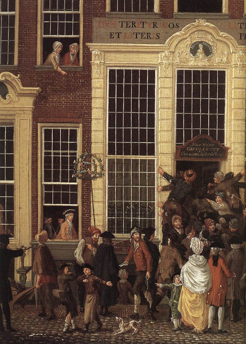 detail